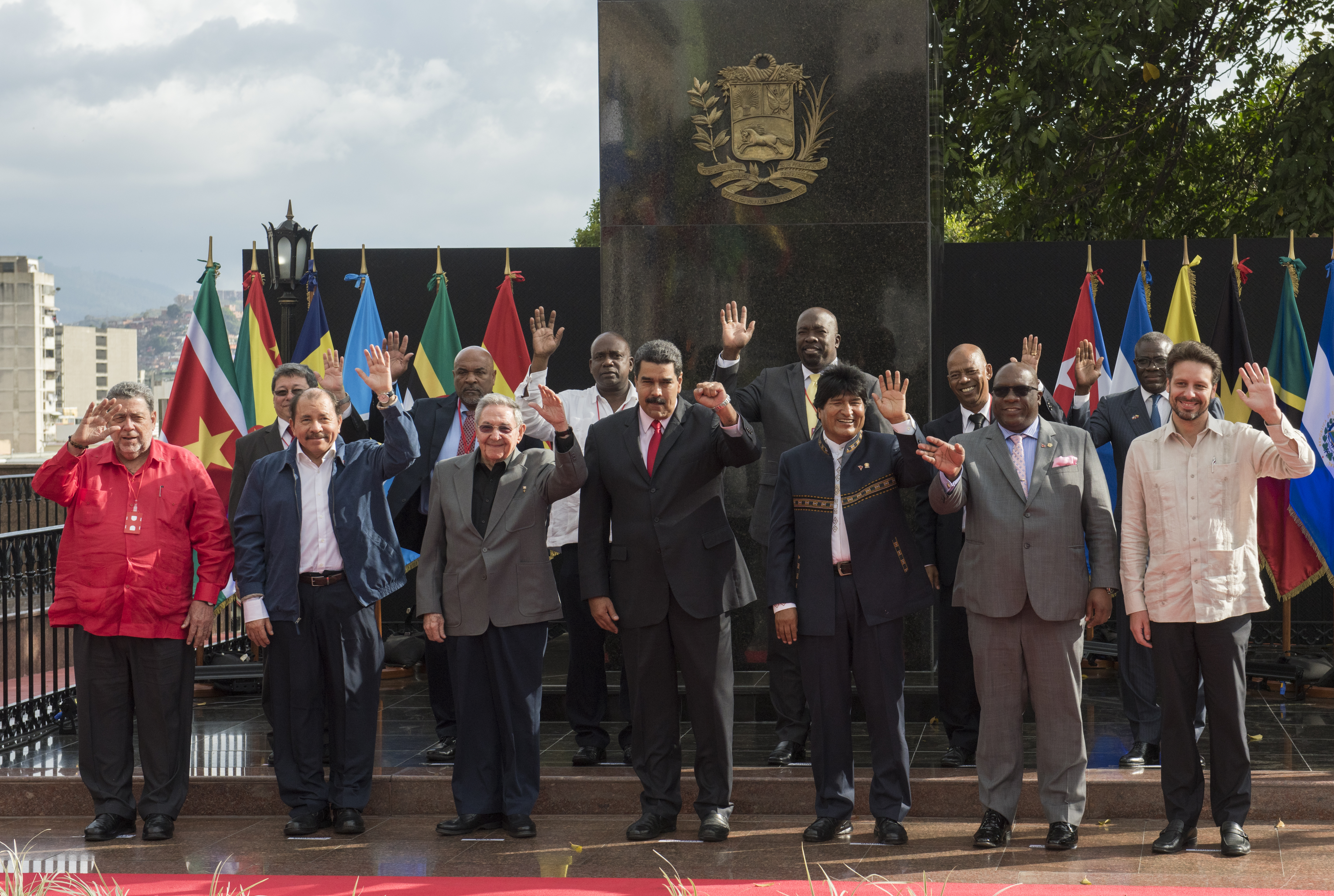 Foto oficial de la XIV Cumbre extraordinaria de la Alianza Bolivariana para los Pueblos de Nuestra América – Tratado de Comercio de los Pueblos (ALBA-TCP) realizada en Caracas, en el marco del cuarto aniversario luctuoso de Hugo Chávez. Jefes de gobierno y representantes diplomáticos de las 11 naciones que integran este organismo, y algunos invitados internacionales, participarán en la reunión.